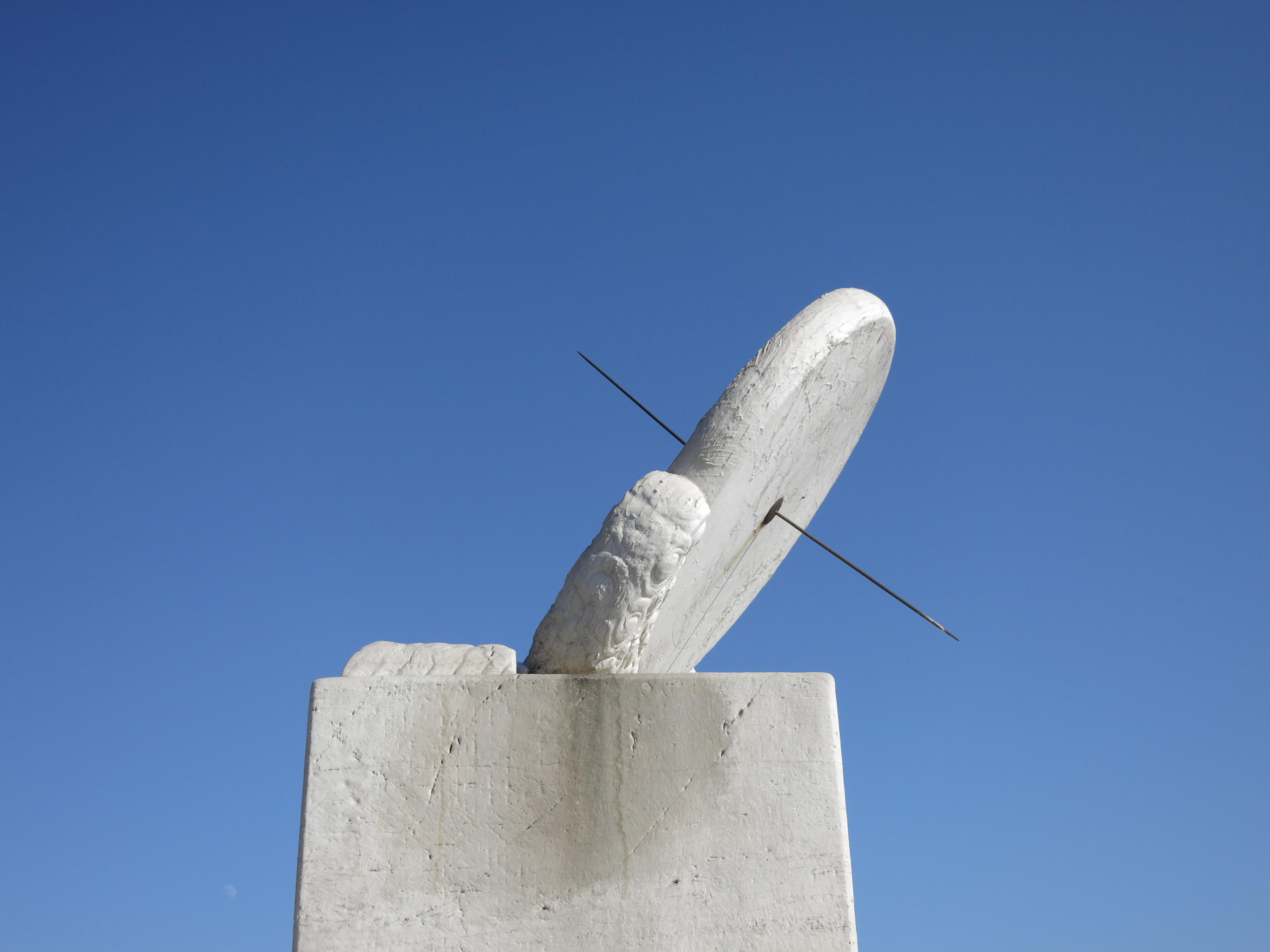 故宮太和殿丹陛東南角的日晷